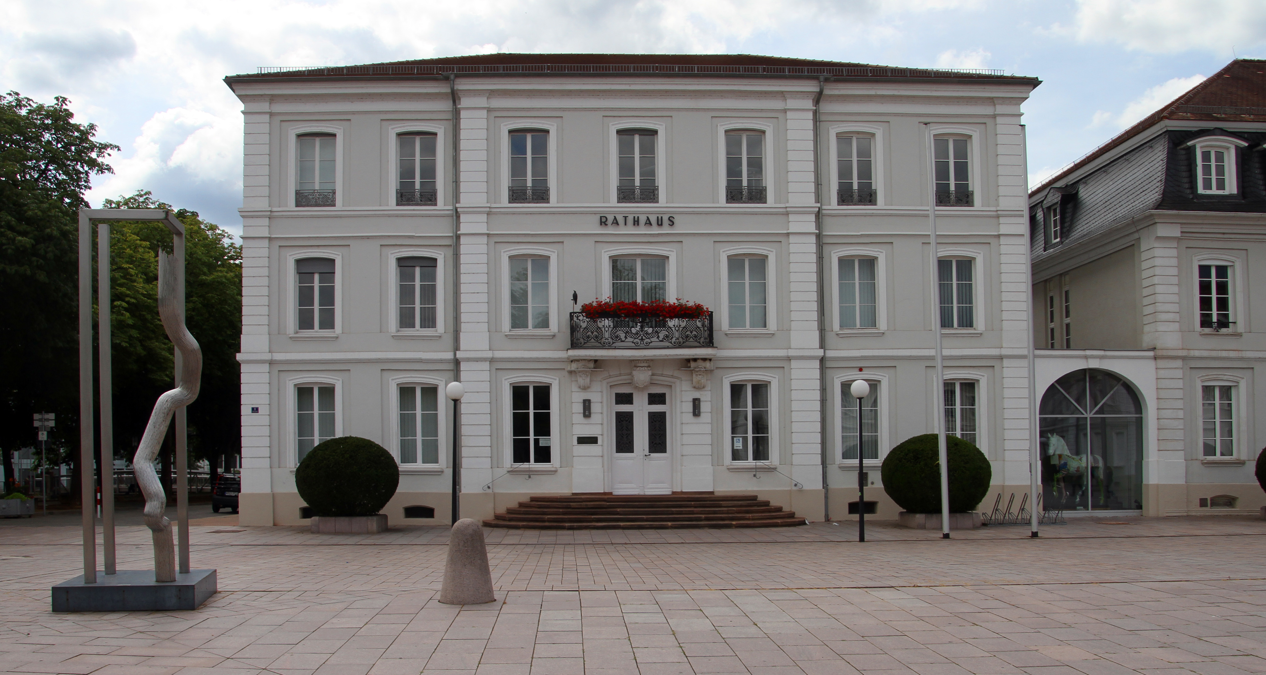 Zweibrücken